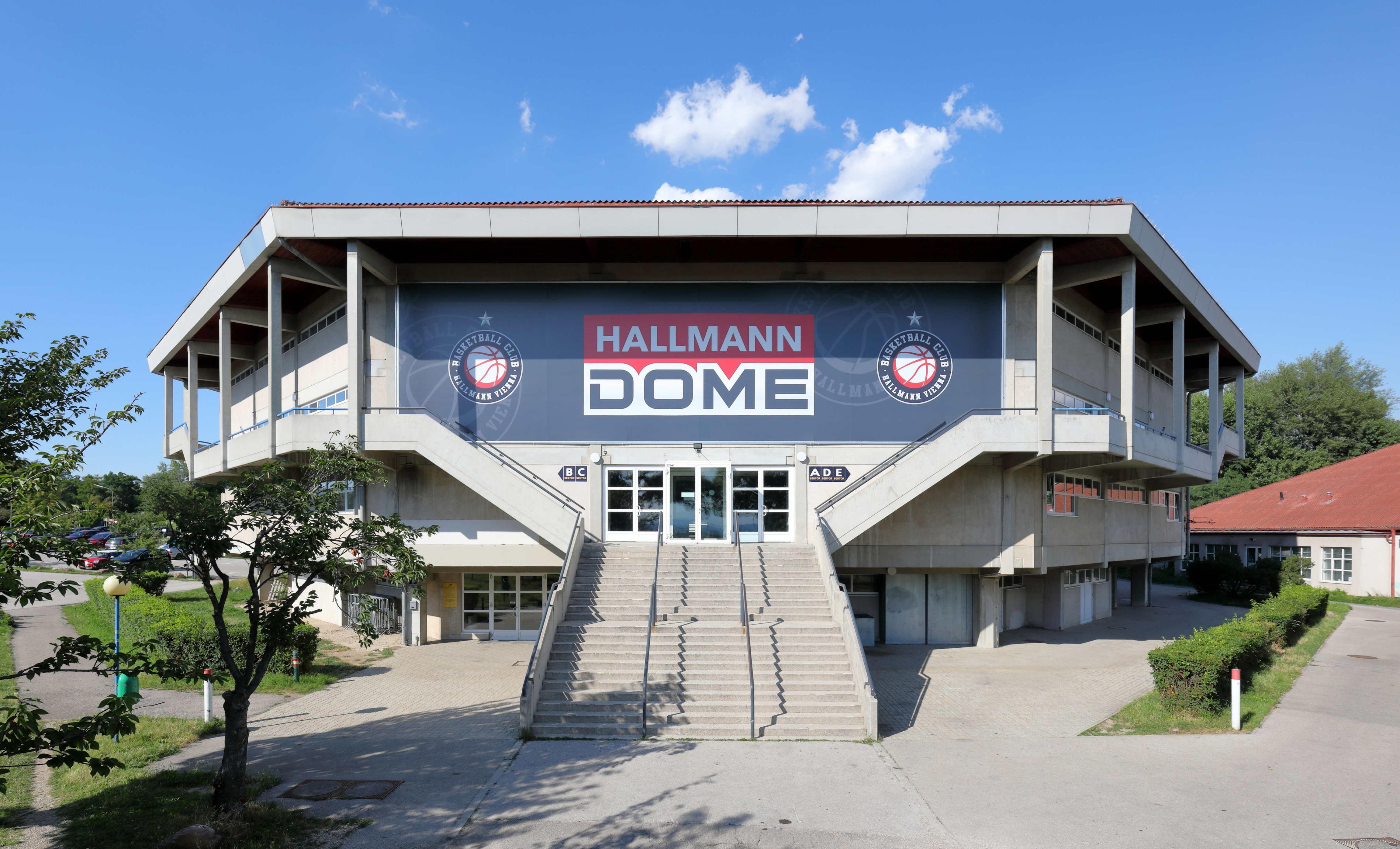 Die Veranstaltungshalle „Hallmann Dome“ an der Adresse Gutheil-Schoder-Gasse 9 im 10. Wiener Bezirk Favoriten. Der Bau wurde als Budokan-Europacenter bzw. Sportzentrum für japanische Kampfsportarten (Judo, Karate usw.) nach Plänen von Franz Richard Schnabel auf Kosten der Tokai-Universität (Japan) und auf einem von der Gemeinde Wien kostenlos zur Verfügung gestellten Grundstück errichtet. Die Grundsteinlegung der 2.151 m² großen Sporthalle mit einer Parkettfläche von 983 m² sowie 934 Sitzen fand am 4. Oktober 1983 und die Eröffnung am 12. November 1984 statt. Die Veranstaltungshalle ist auch die Heimstätte des Basketballclubs Hallmann Vienna. Ursprünglich war die Bezeichnung „Matsumae Budocenter“ und eine Zeit lang auch „Admiral Dome“.